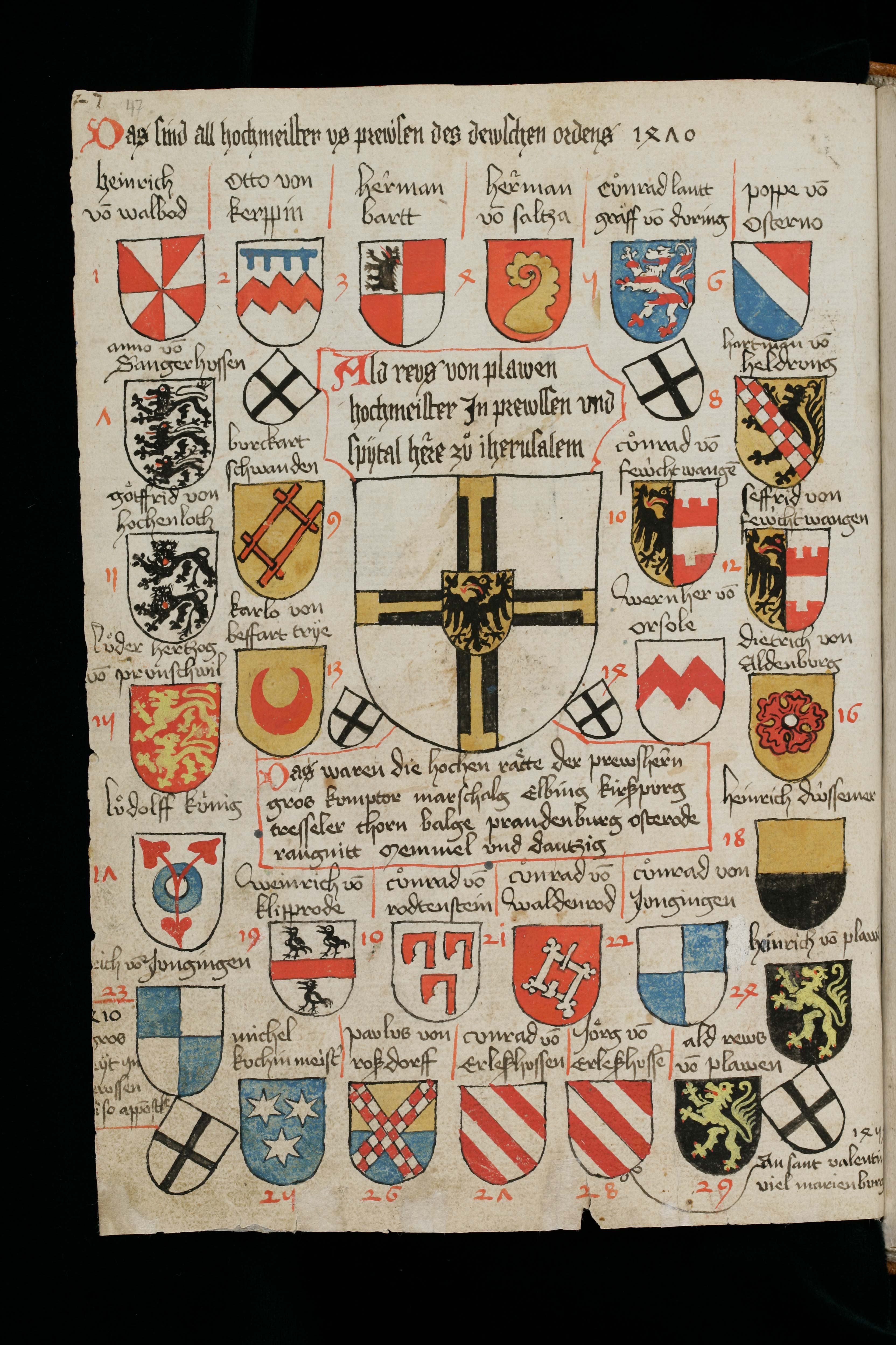 Wappenbuch des St. Galler Abtes Ulrich Rösch; Stiftsbibliothek St. Gallen, Cod. sang. 1084 Wappen